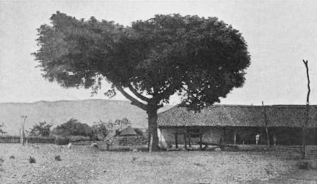 Ceiba de Ipala, Chiquimula en Guatemala. Publicada en 1897